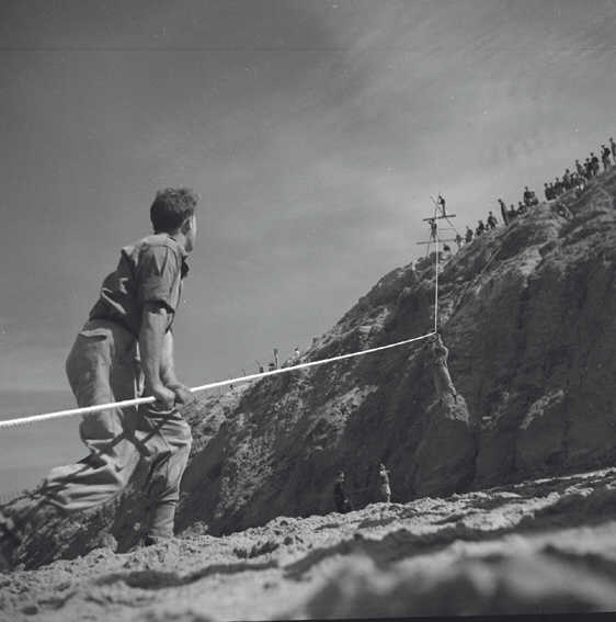 אימוני גדנ"ע